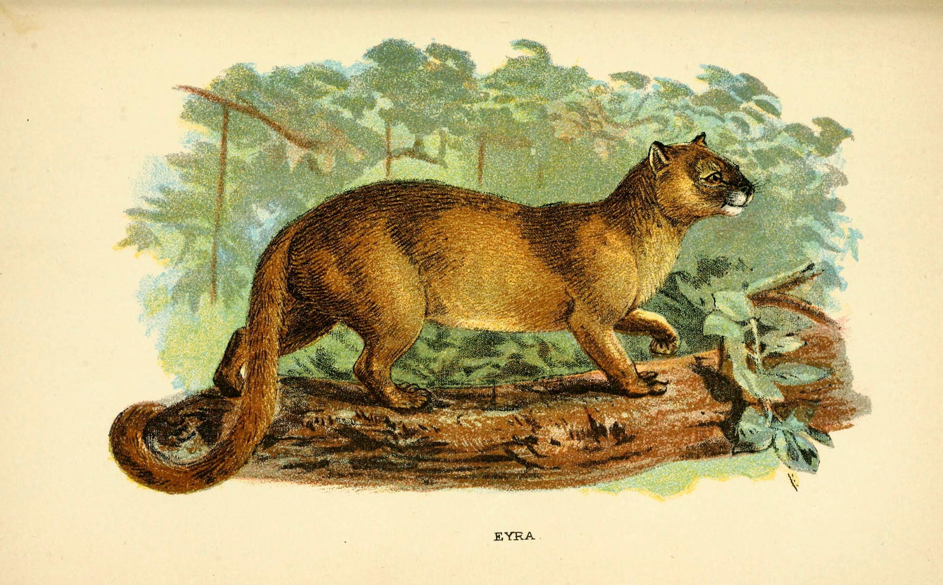 Eyra / Felis Eyra